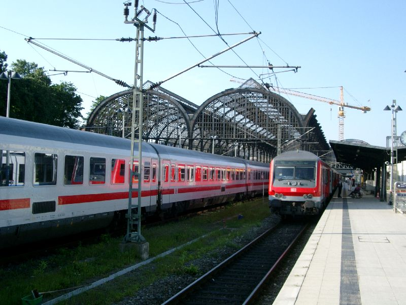 Kieler Hauptbahnhof mit nur noch halber Bahnsteigüberdachung im Winter 2002/2003